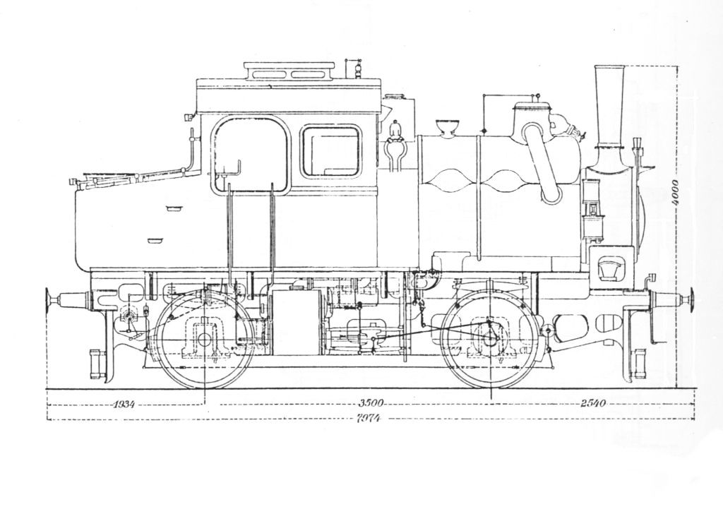 MÁV 10 sorozatú gőzmozdonya